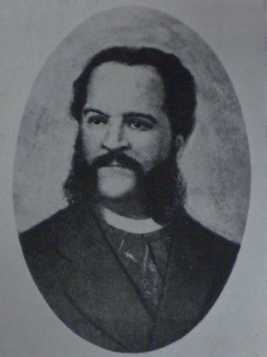 León Pallieri